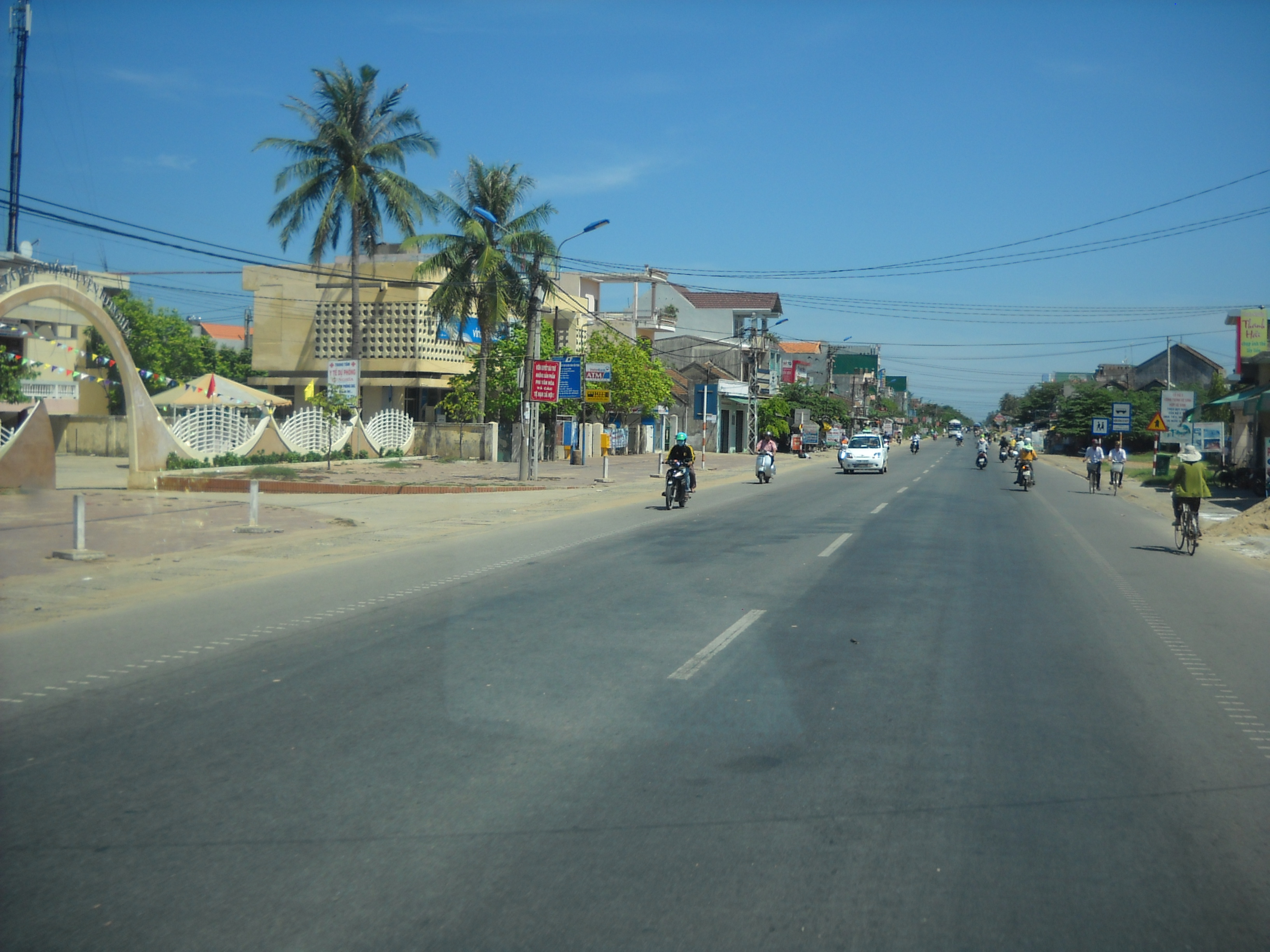 Thị trấn La Hà